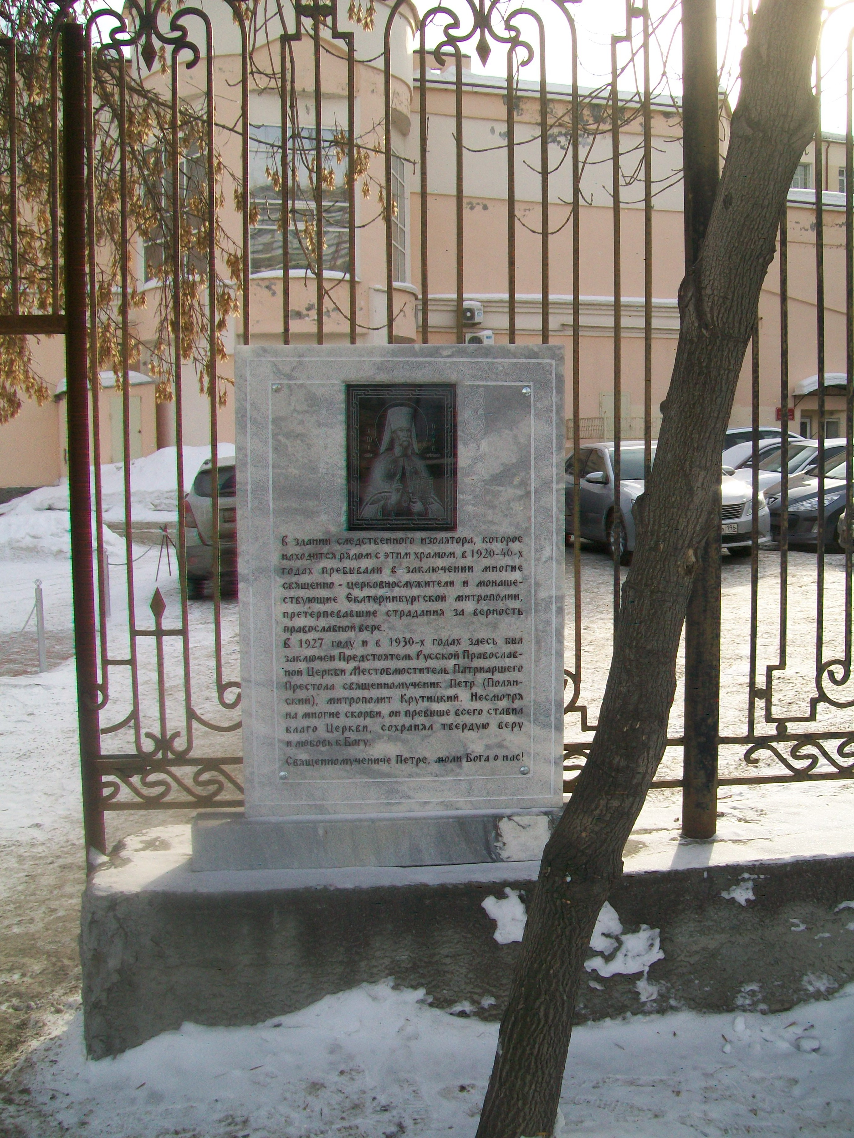 Мемориальная доска в память о Полянском и священниках Екатеринбургской епархии, содержавшихся в СИЗО Свердловска